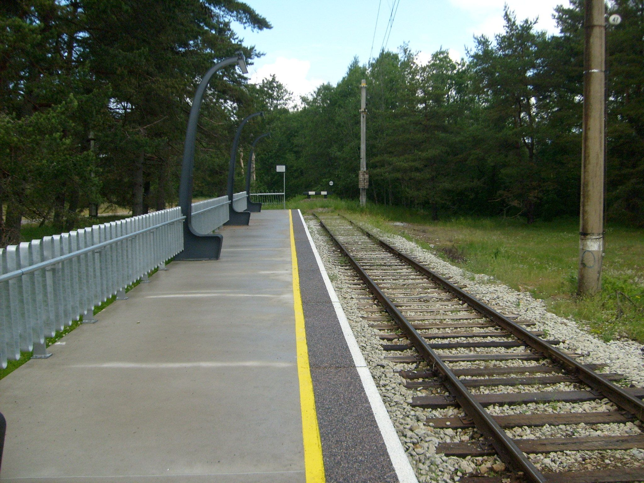 Klooga-Ranna raudteepeatus, Kloogaranna küla